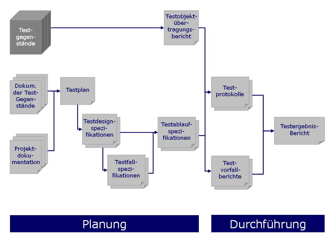 Zusammenhang der Schritte und Dokumente beim Softwaretest, laut IEEE 829